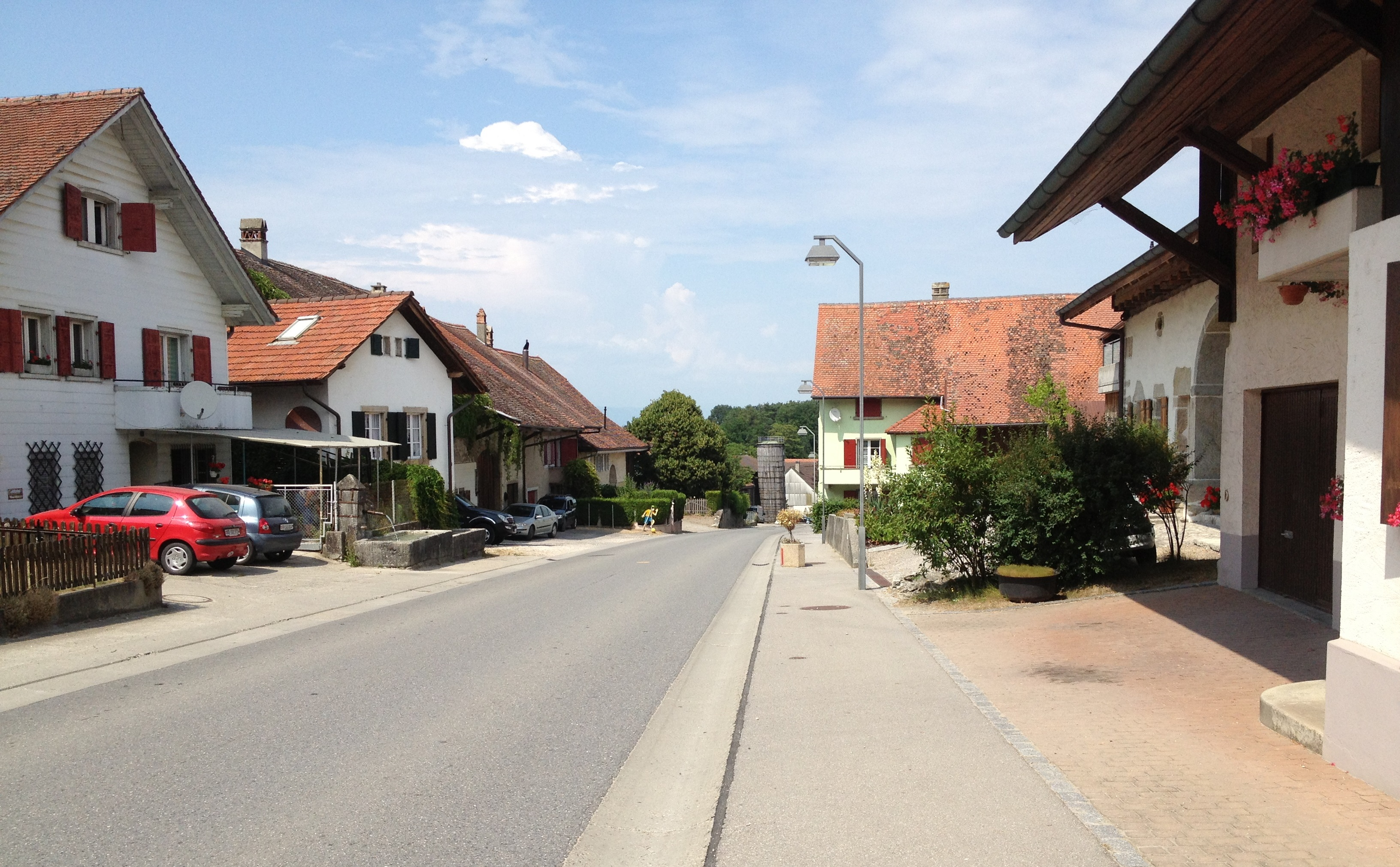 Le village de Vesin dans la commune fribourgeoise de Cugy en Suisse.